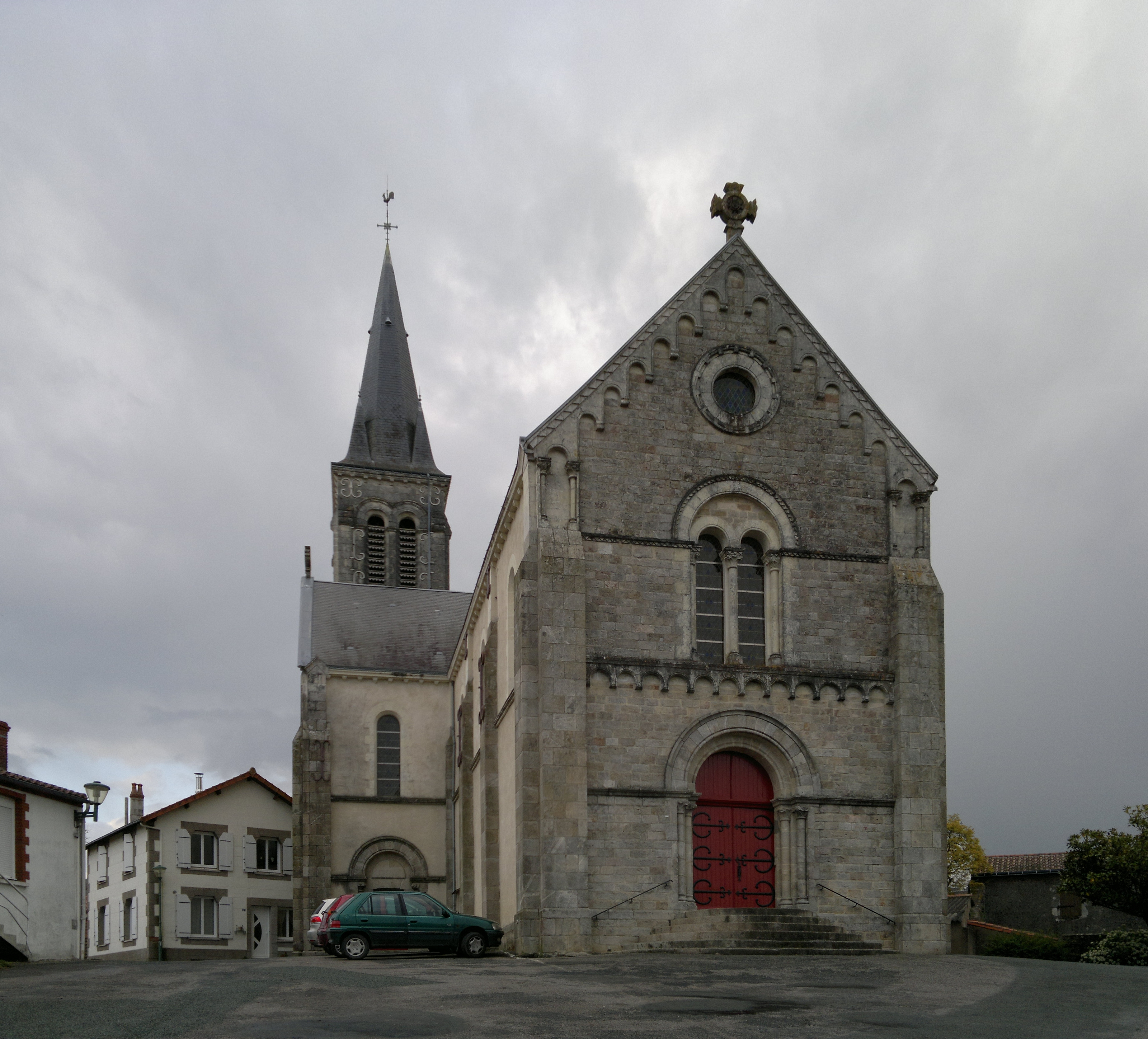 Église Notre-Dame de l'Assomption (XIX°), Fr-85-Mormaison.